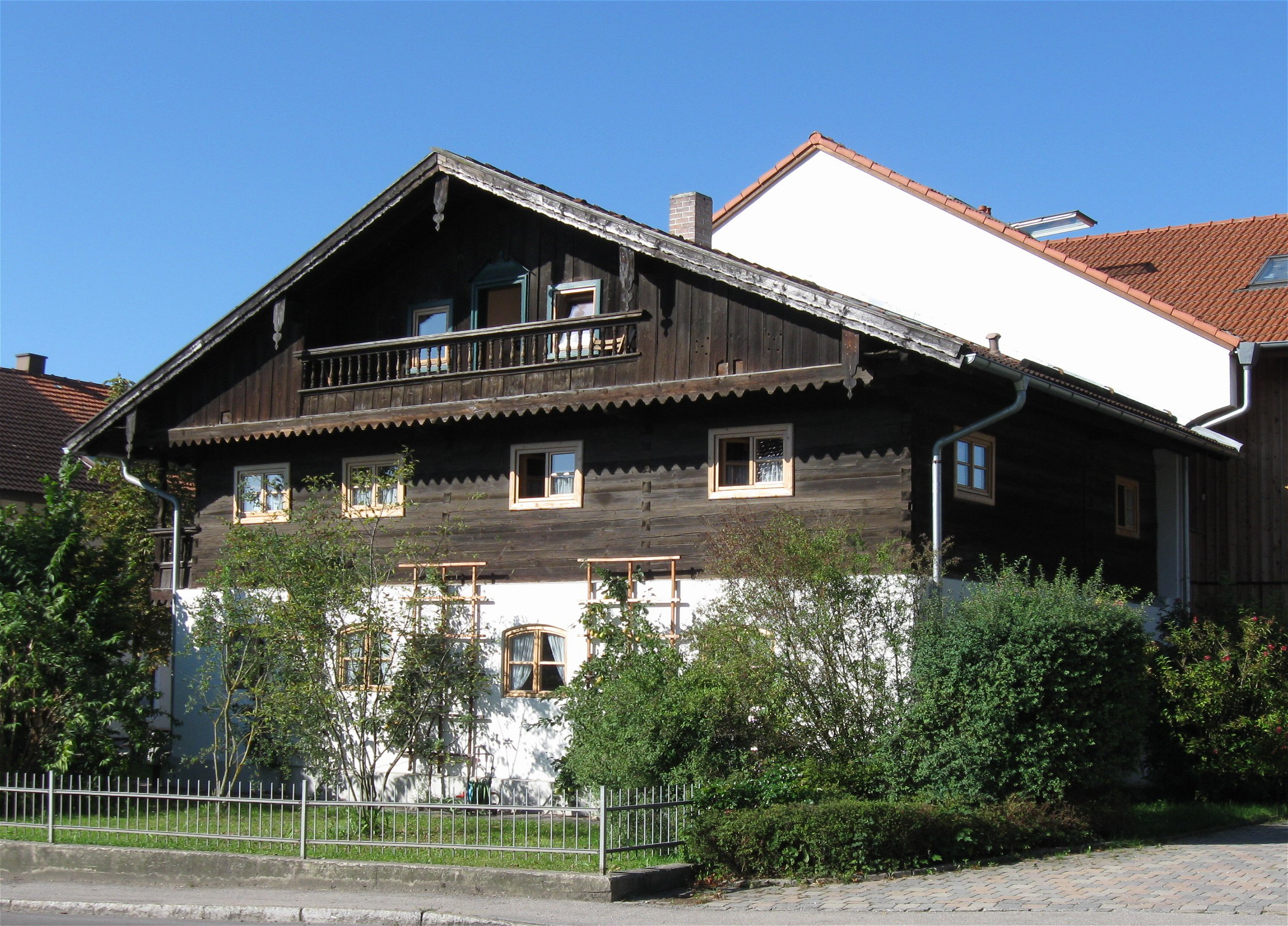 Münchener Straße 11. Wohnteil des ehem. Einfirsthofes, zweigeschossige mit Blockbau-Obergeschoss, Hochlaube und flachem Satteldach, 3. Viertel 18. Jh.